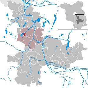 Schwerin in Brandenburg (Country) - District Dahme-Spreewald